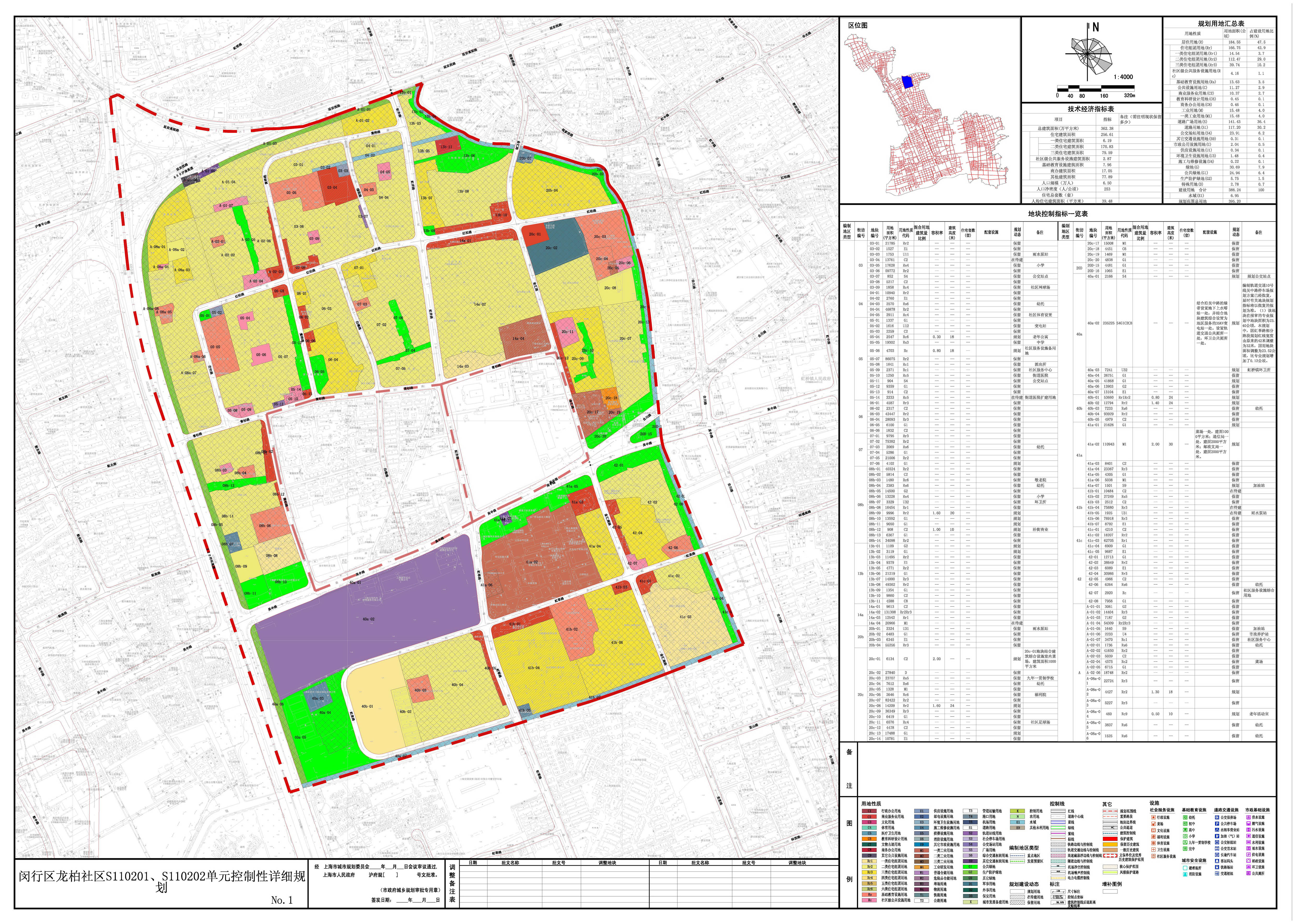 龙柏社区S110201、S110202单元控制性详细规划（沪府规〔2013〕84号规划文件附件，参见shgtj.gov.cn/ghsp/ghsp/mh/201401/t20140120 618835.html）